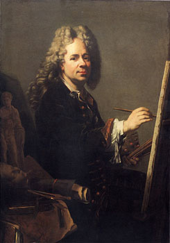 Self-portrait